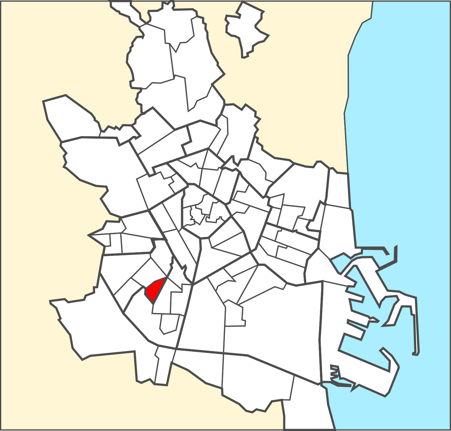 Localització del barri dins de la ciutat de València.